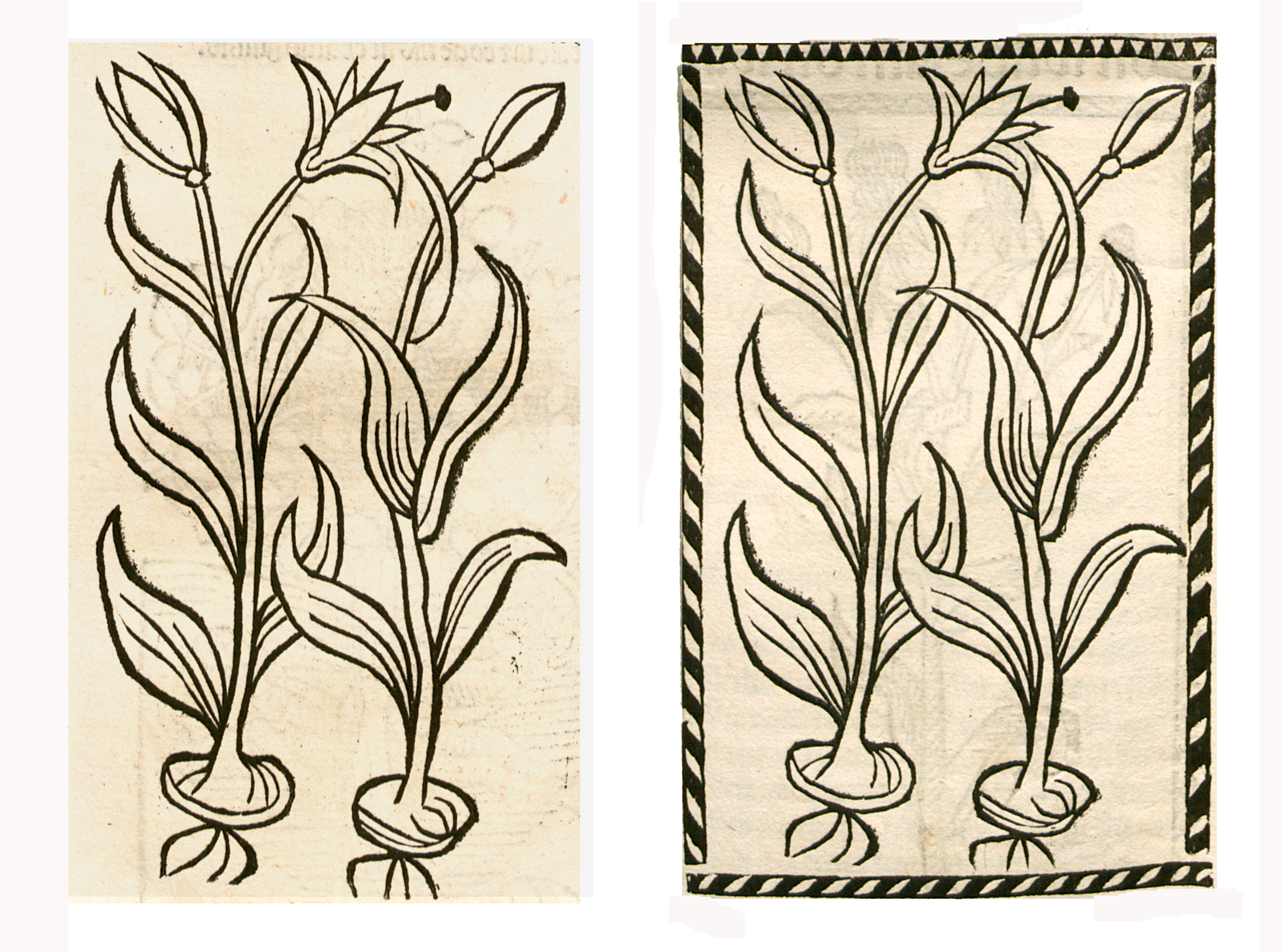 Abbildung von: Xipan Wurtz (Lathyrus tuberosus)